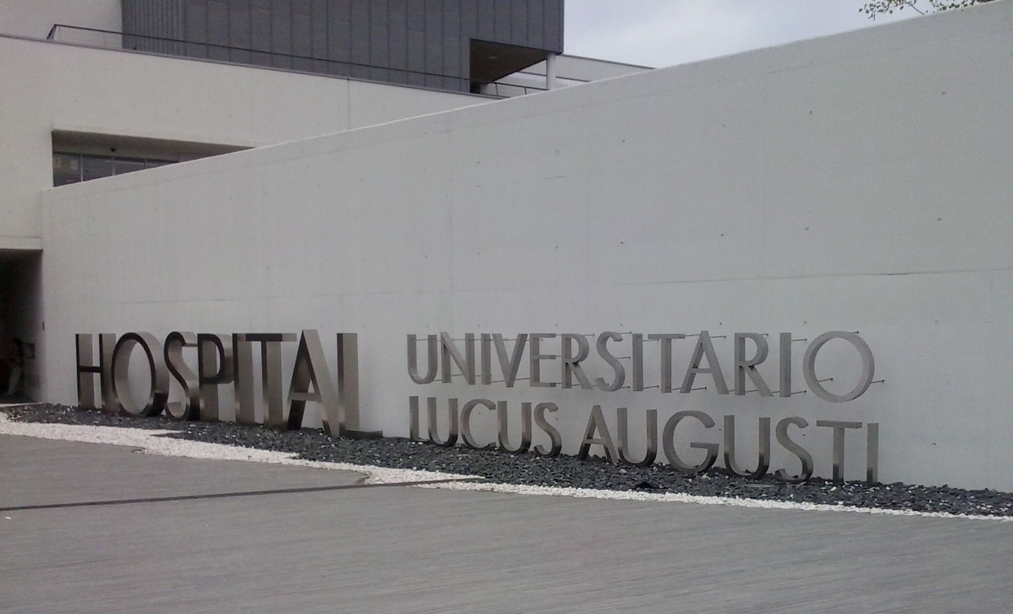 Cartel na porta do hospital HULA en Lugo Galiza Spain